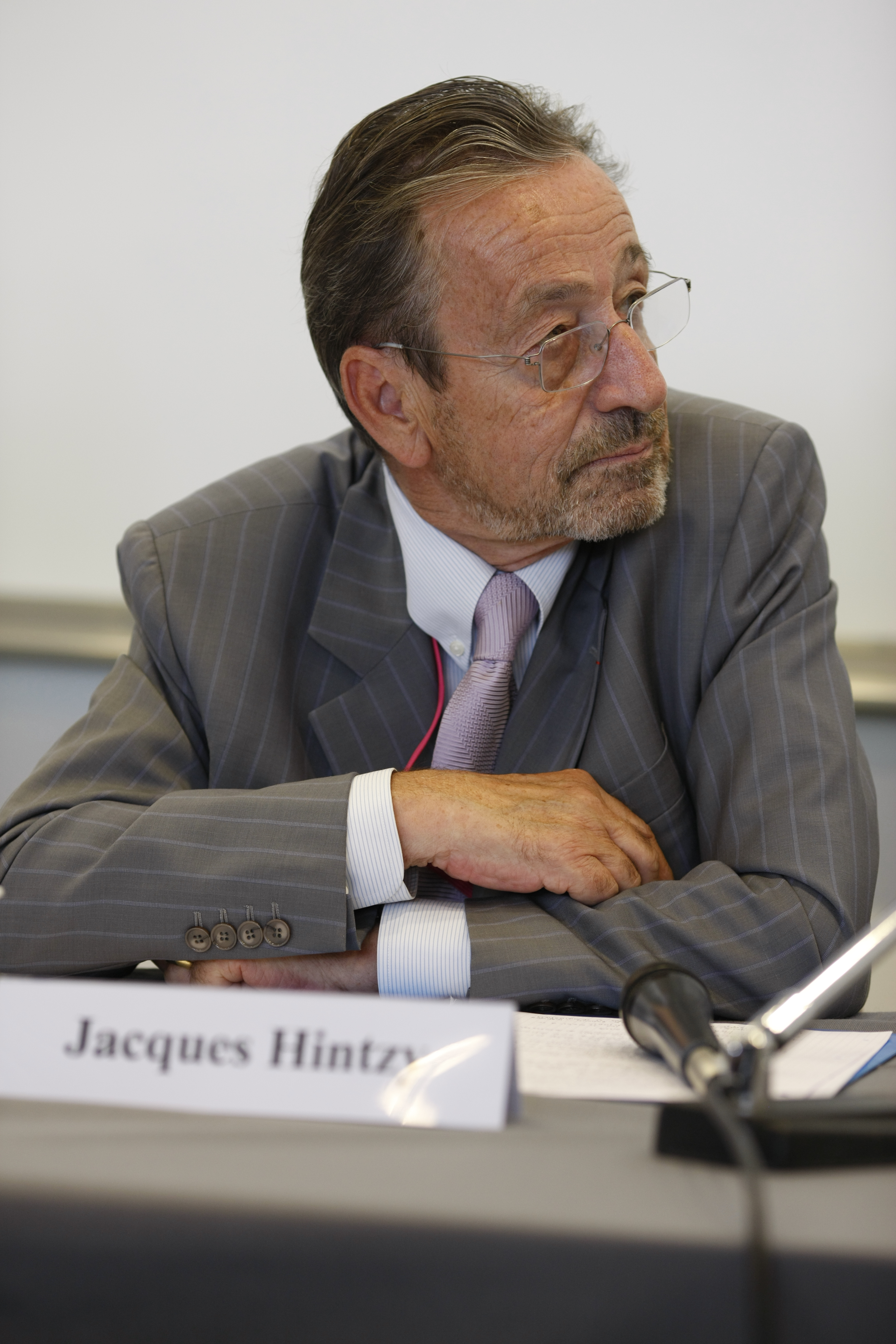 Jacques Hintzy